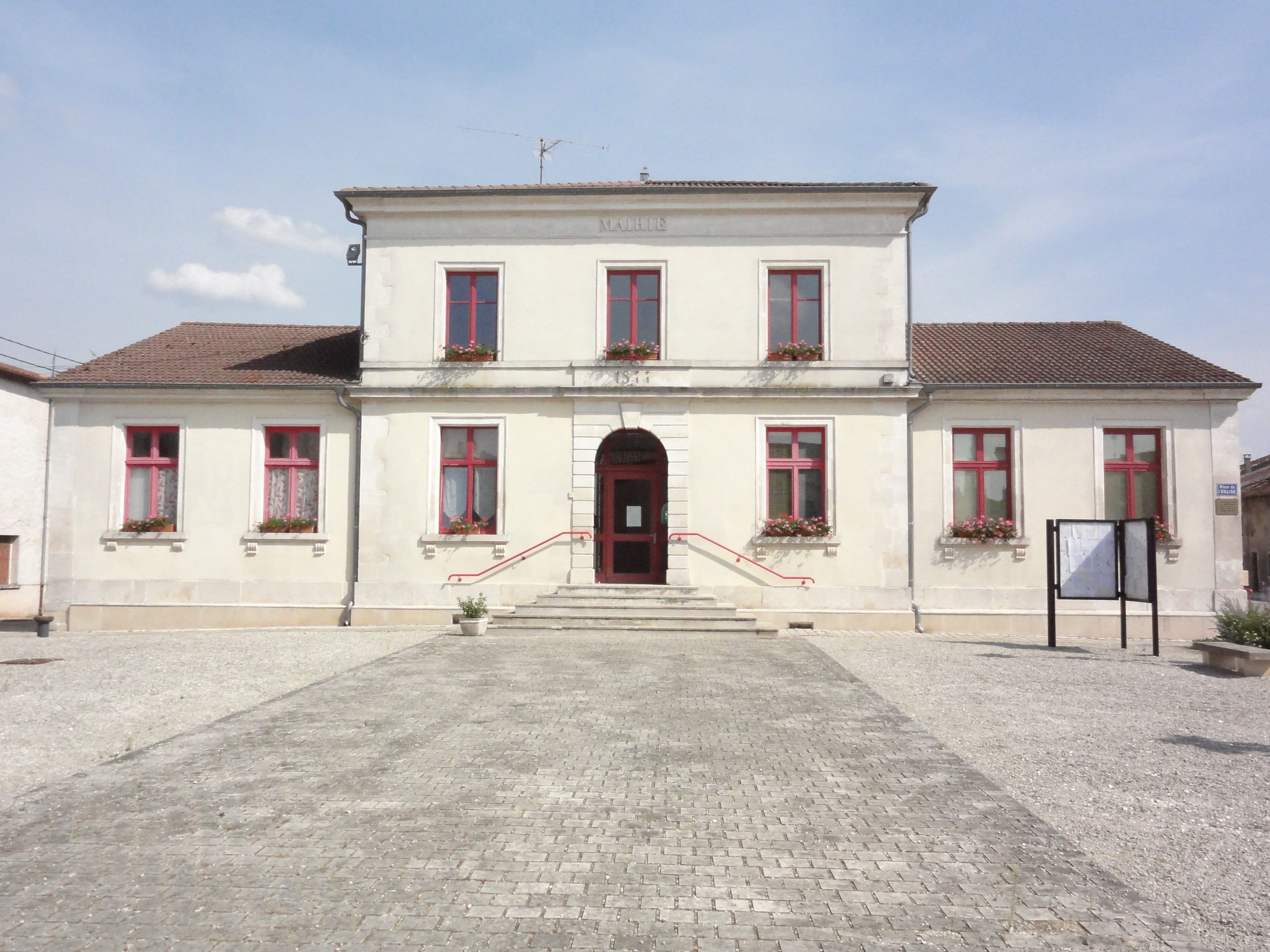 Troussey (Meuse) mairie